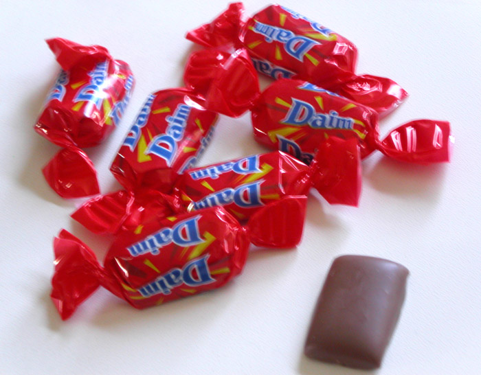 Daim Schokoriegel / Daim chocolate